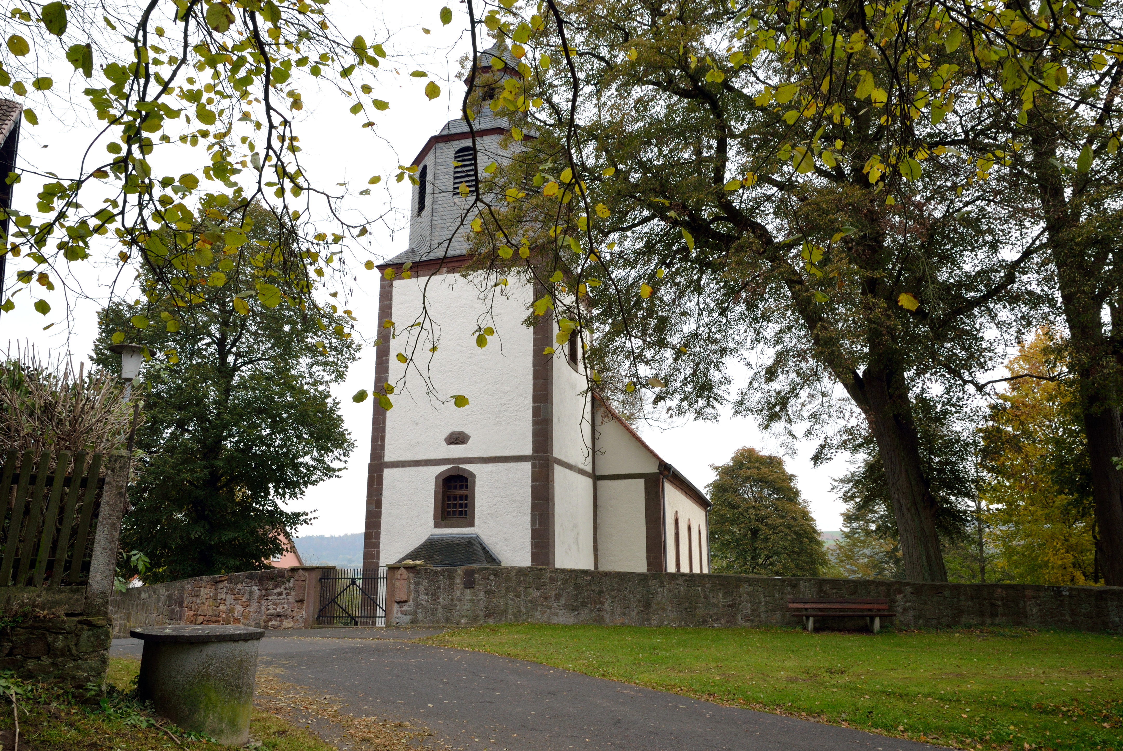 Die Michaeliskirche in Wohra